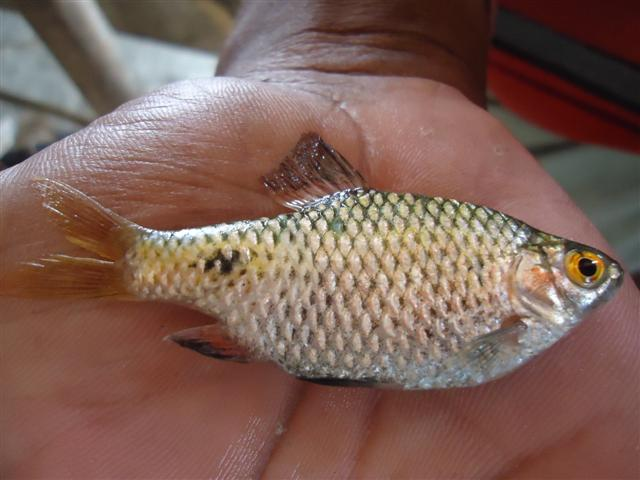 Bangladesh, Gorai River, Kushtia, length: 7.6 cm